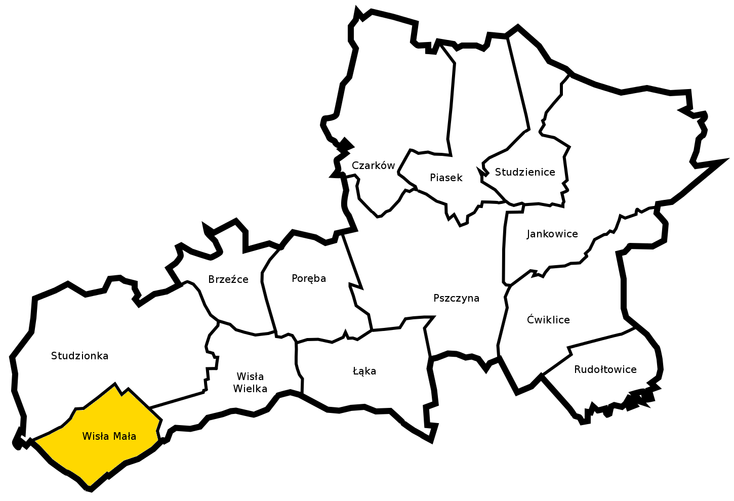 Gmina Pszczyna - sołectwo Wisła Mała